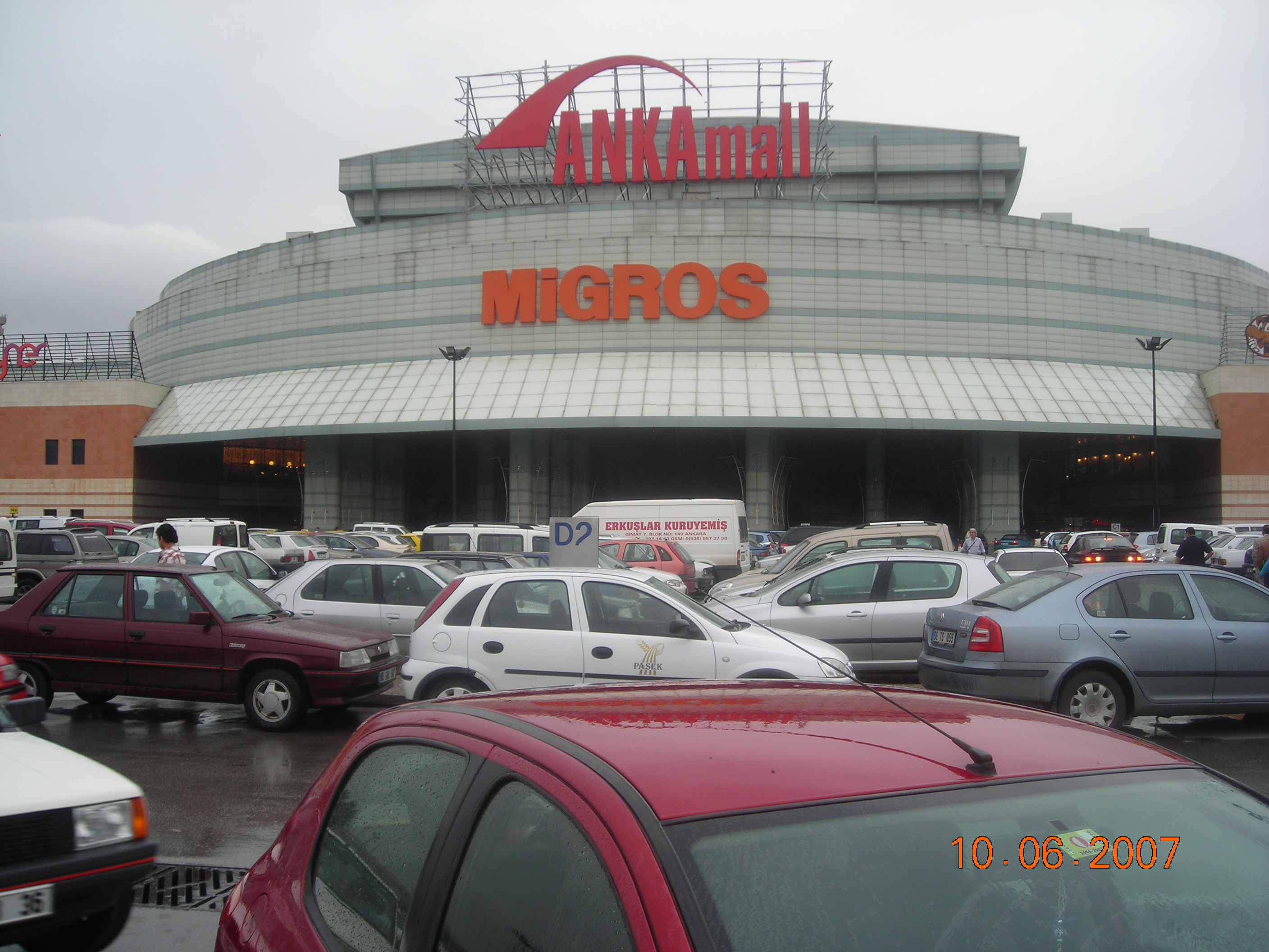 Ankara Ankamall